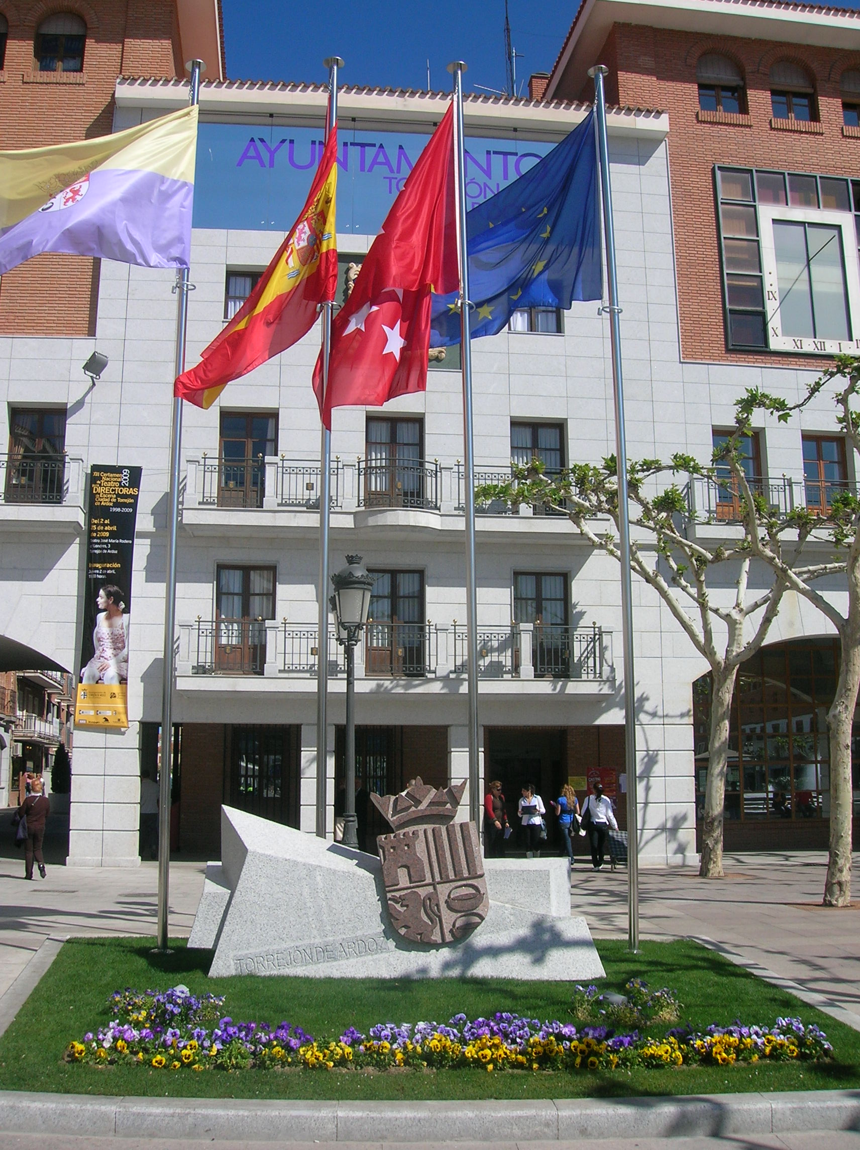 Banderas en la Plaza Mayor y conjunto escultórico del escudo del municipio